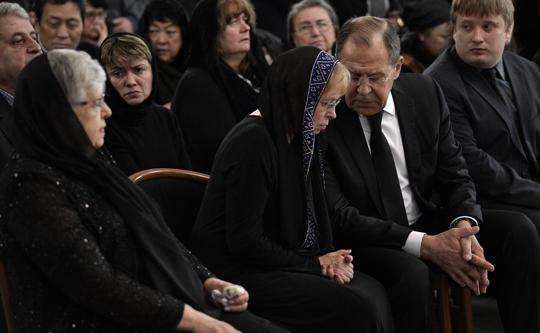 Министр иностранных дел Сергей Лавров с родными посла Российской Федерации в Турции, трагически погибшего 19 декабря в Анкаре в результате террористического акта